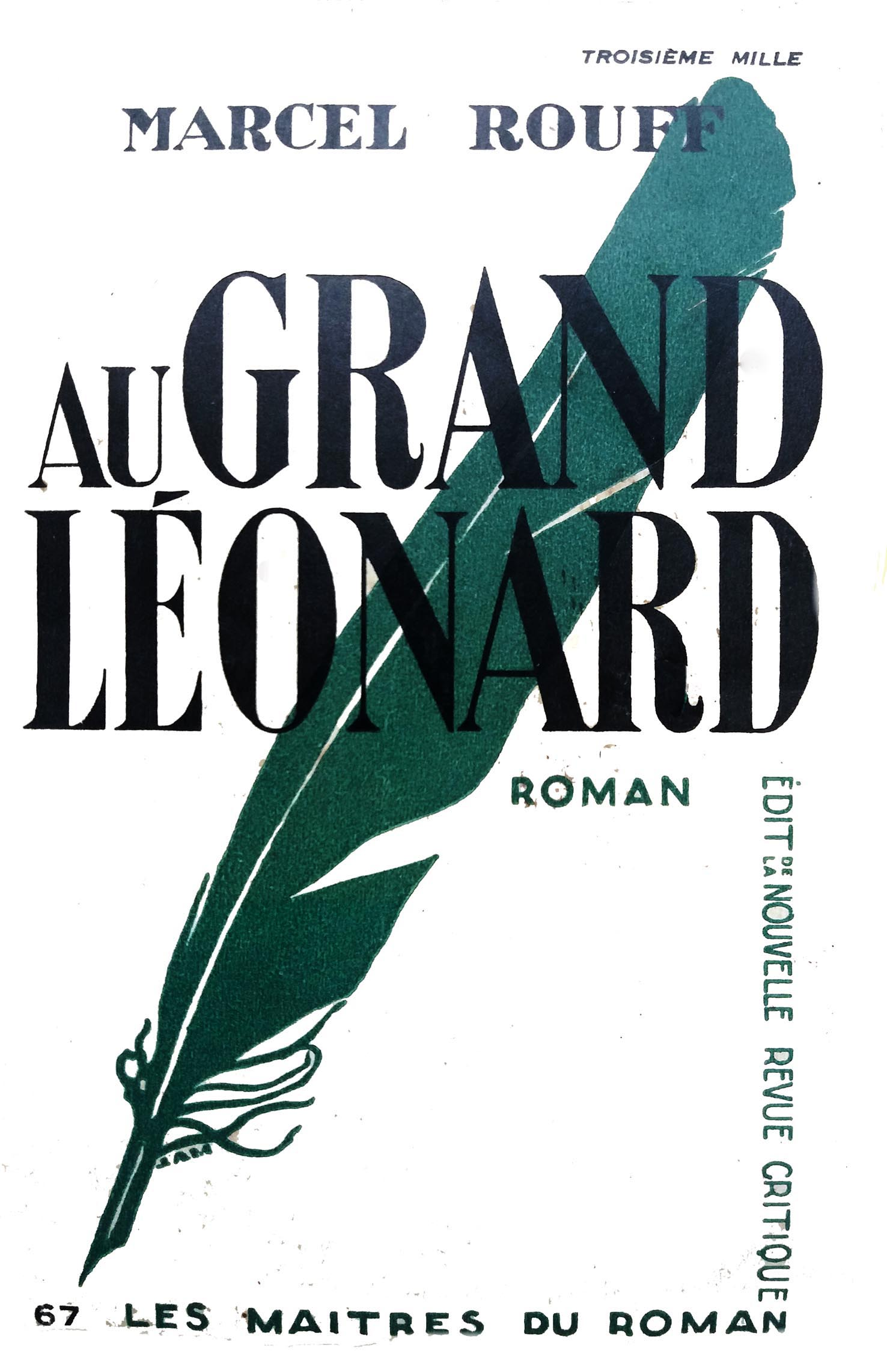 couverture du Grand Leonard